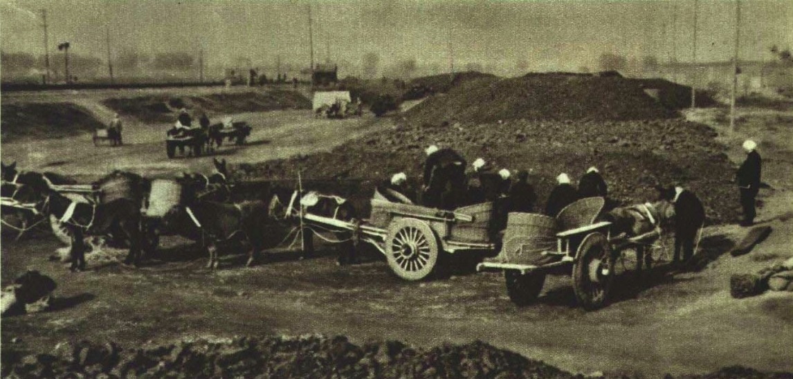 1952年邢台车站